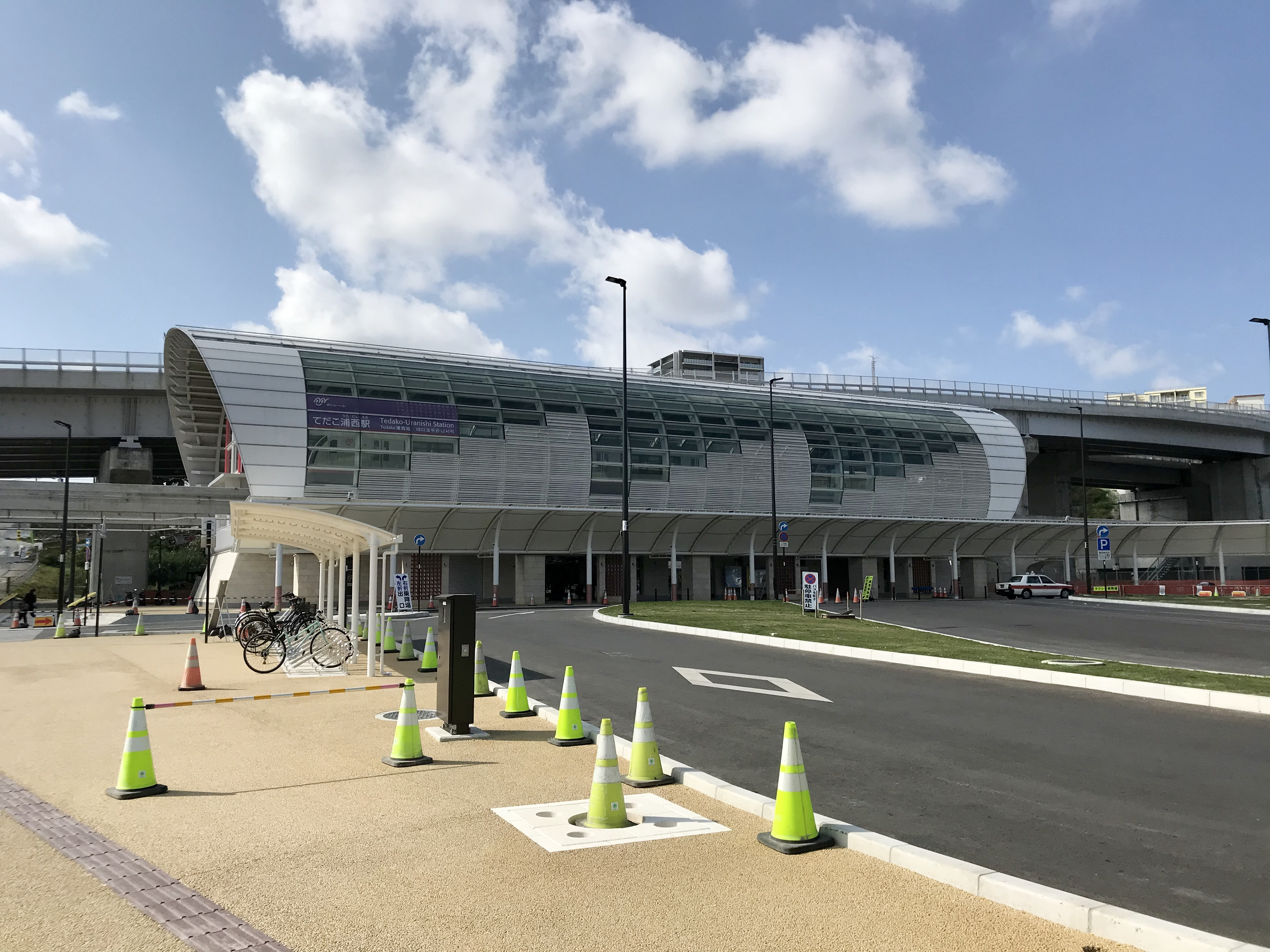 沖縄都市モノレール（ゆいレール）てだこ浦西駅